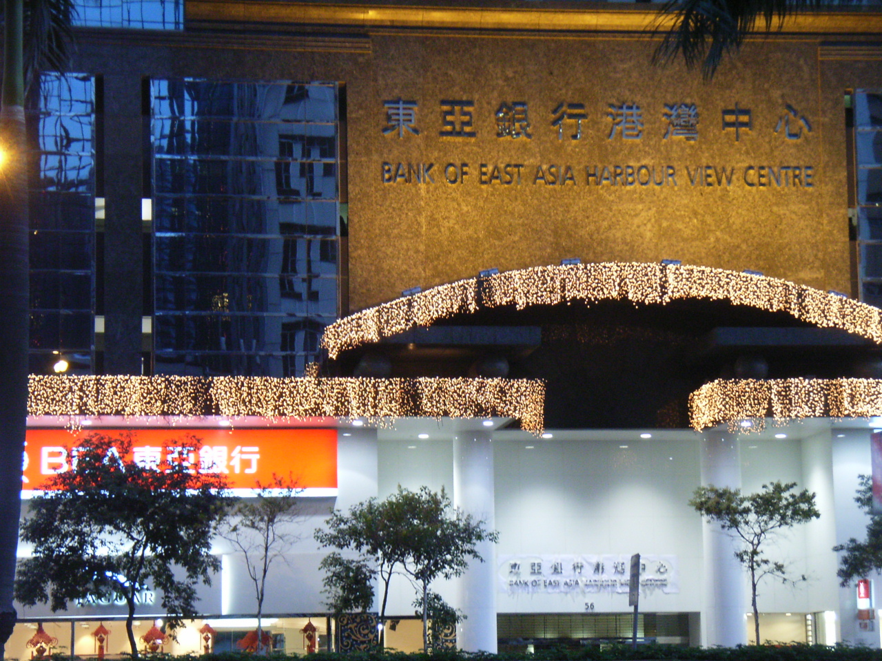 東亞銀行港灣中心 (Bank of East Asia Harbour View Centre)，前稱第一太平銀行中心，是zh:香港zh:灣仔北的一座zh:商業zh:大廈。大廈樓高29樓，基座4層是zh:停車場，5樓以上為zh:辦公室，每層約7.8千平方呎。大廈於zh:1991年落成，發展商是zh:華人置業有限公司。 東亞銀行港灣中心位於zh:灣仔zh:告士打道51至57號。 Photo by me.